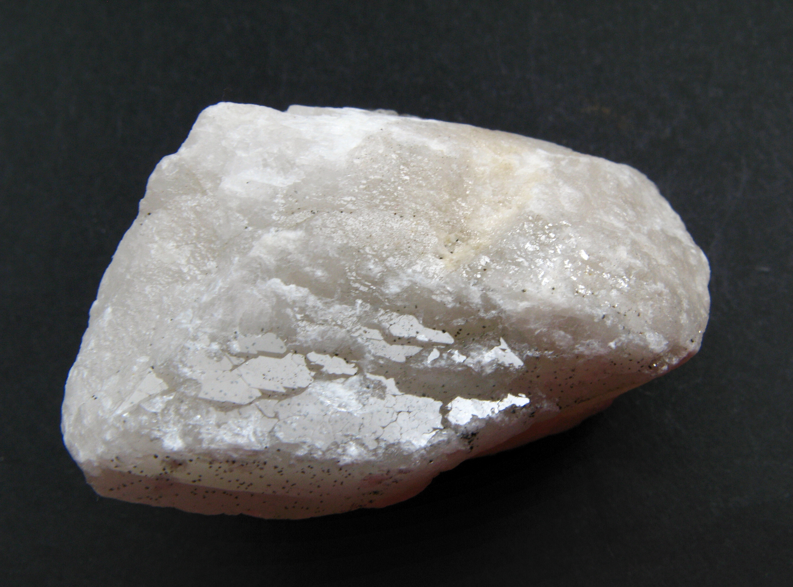 Witherit